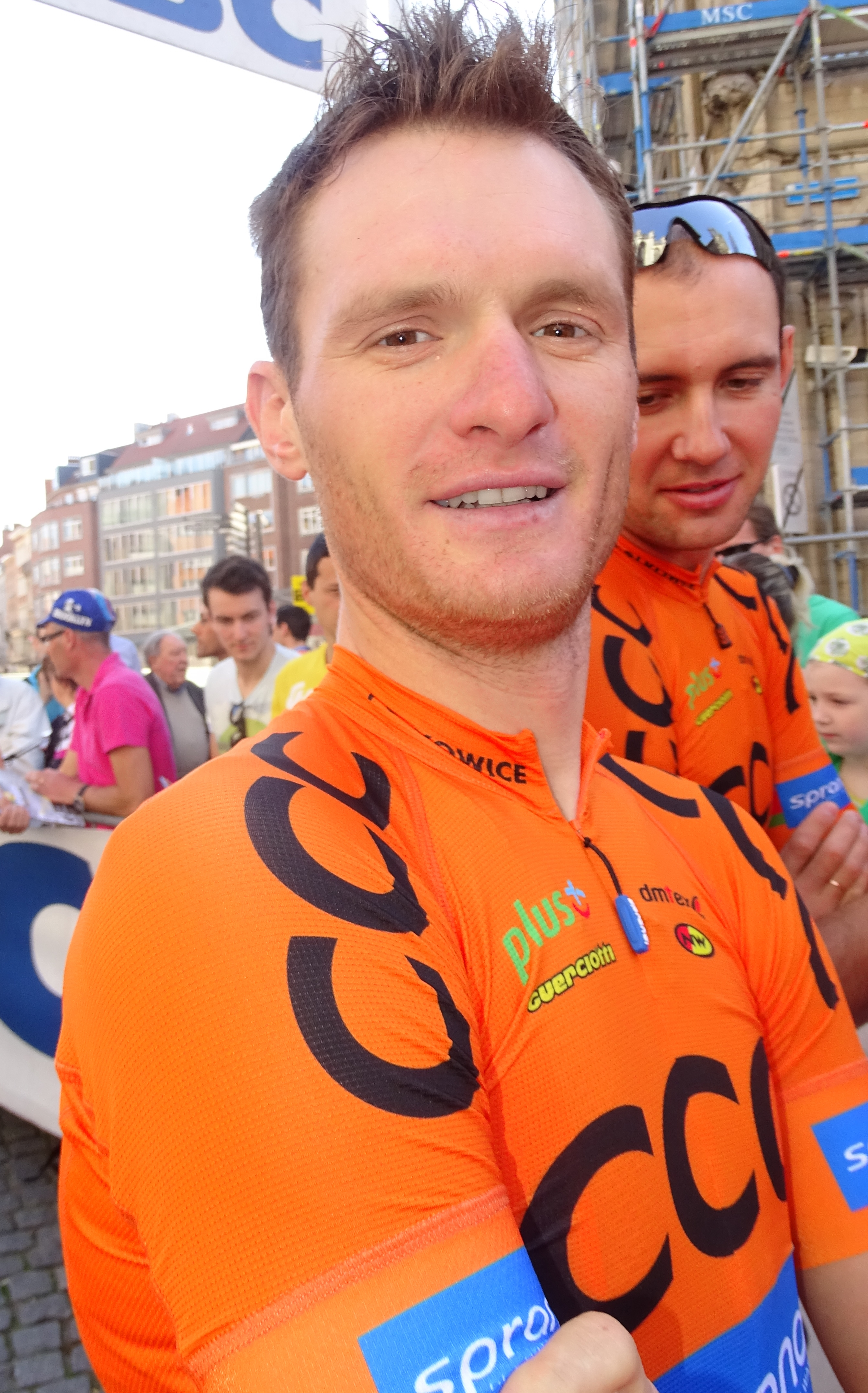 Reportage réalisé le mercredi 15 avril à l'occasion du départ de la Flèche brabançonne 2015 à Louvain, Belgique.